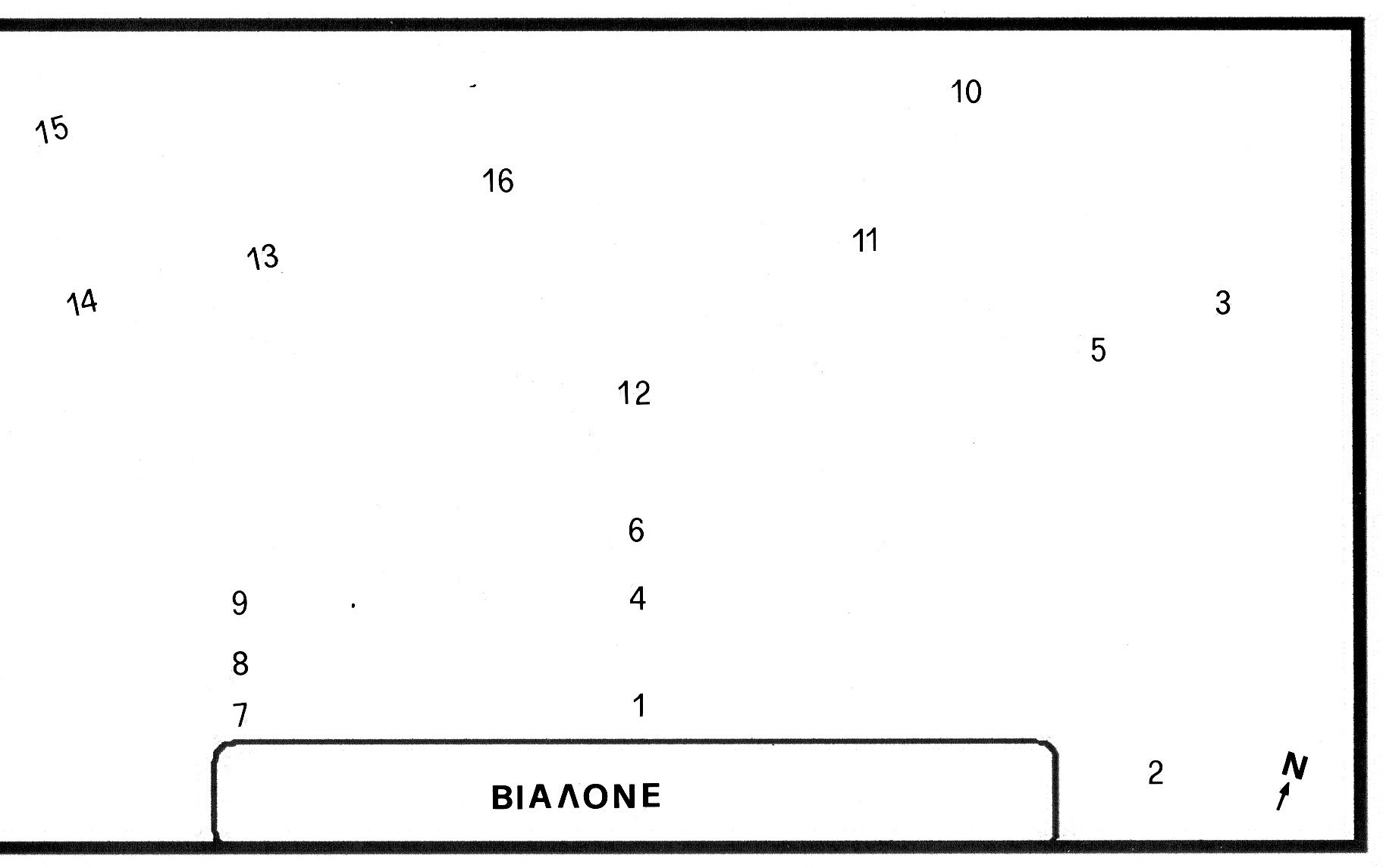 Τοπογραφικό σχήμα του κήπου της Βίλα ντ' Έστε με αριθμημένα τα σιντριβάνια